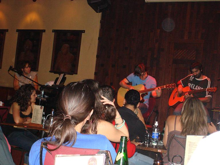 Foto tomada en Jazz Café, Costa Rica el 16/08/06 en el concierto "Gandhi Acústico".